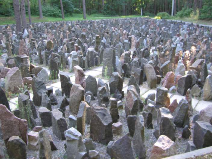 Mežciems, Vidzemes priekšpilsēta, Rīga, Latvia